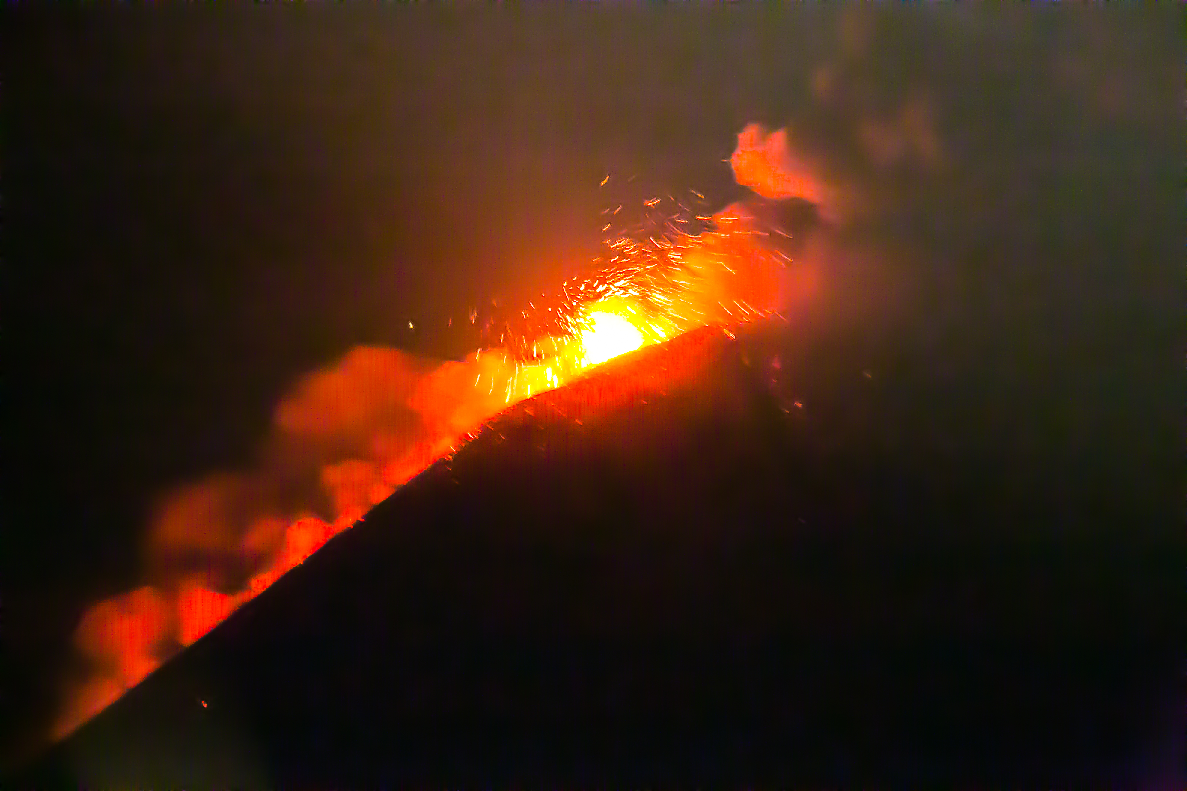 Erupción volcán Momotombo. 2 de diciembre 2015. Nicaragua